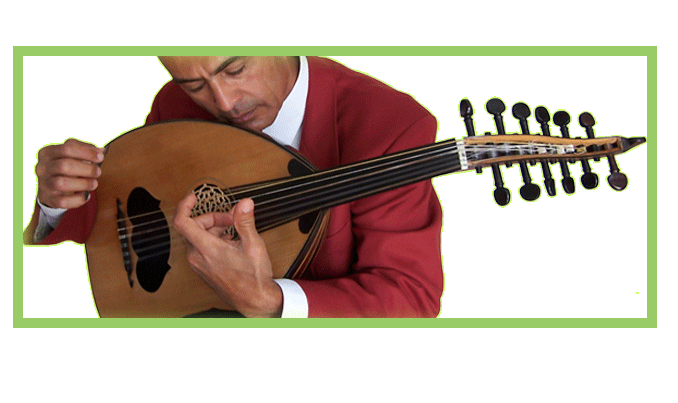 hussein el masry - compositeur - luthiste